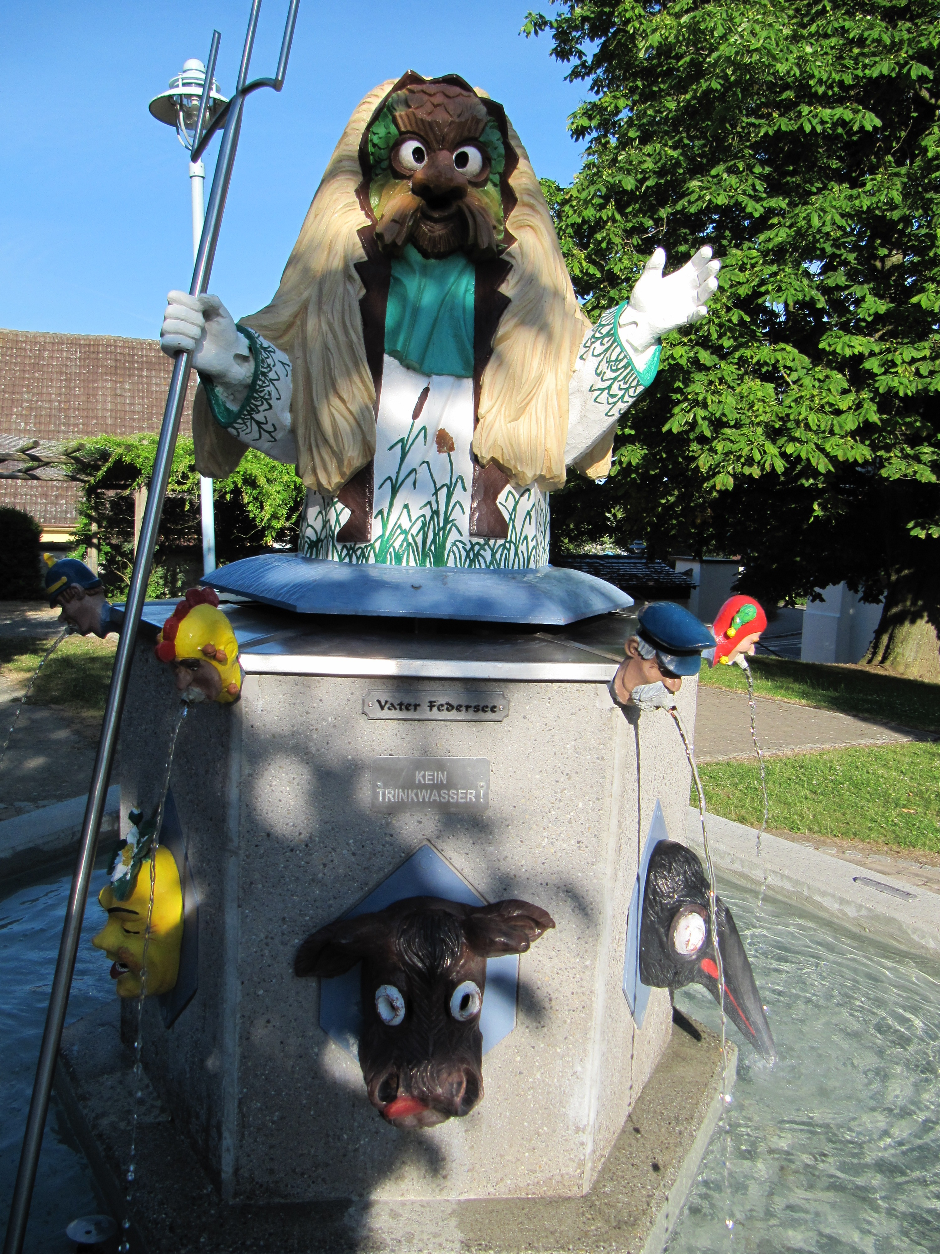 Bad Buchau